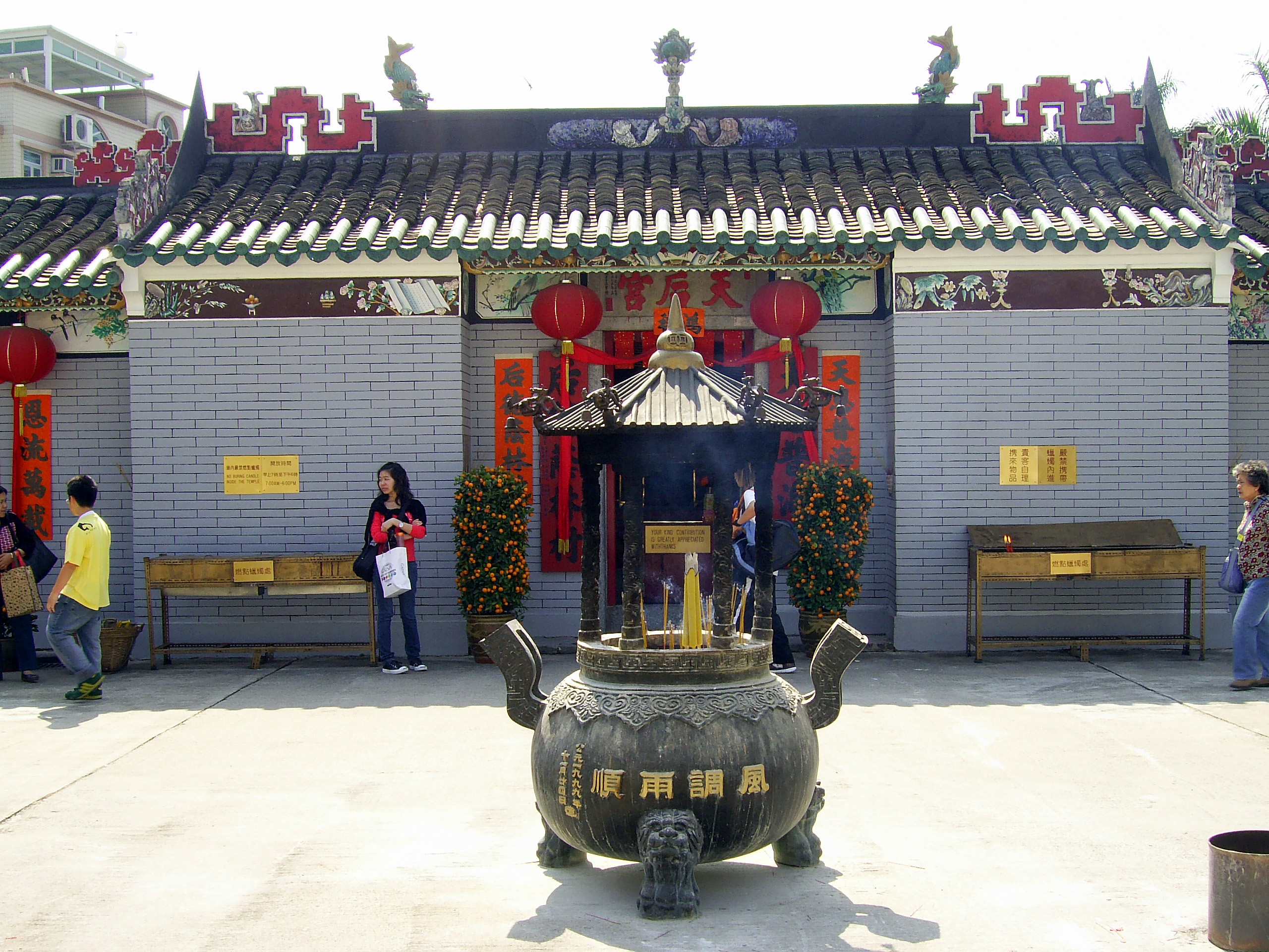 中文（香港）: 林村天后廟